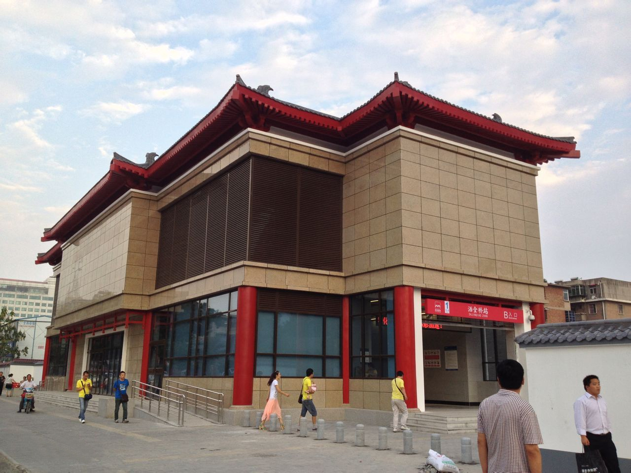 西安地铁车站